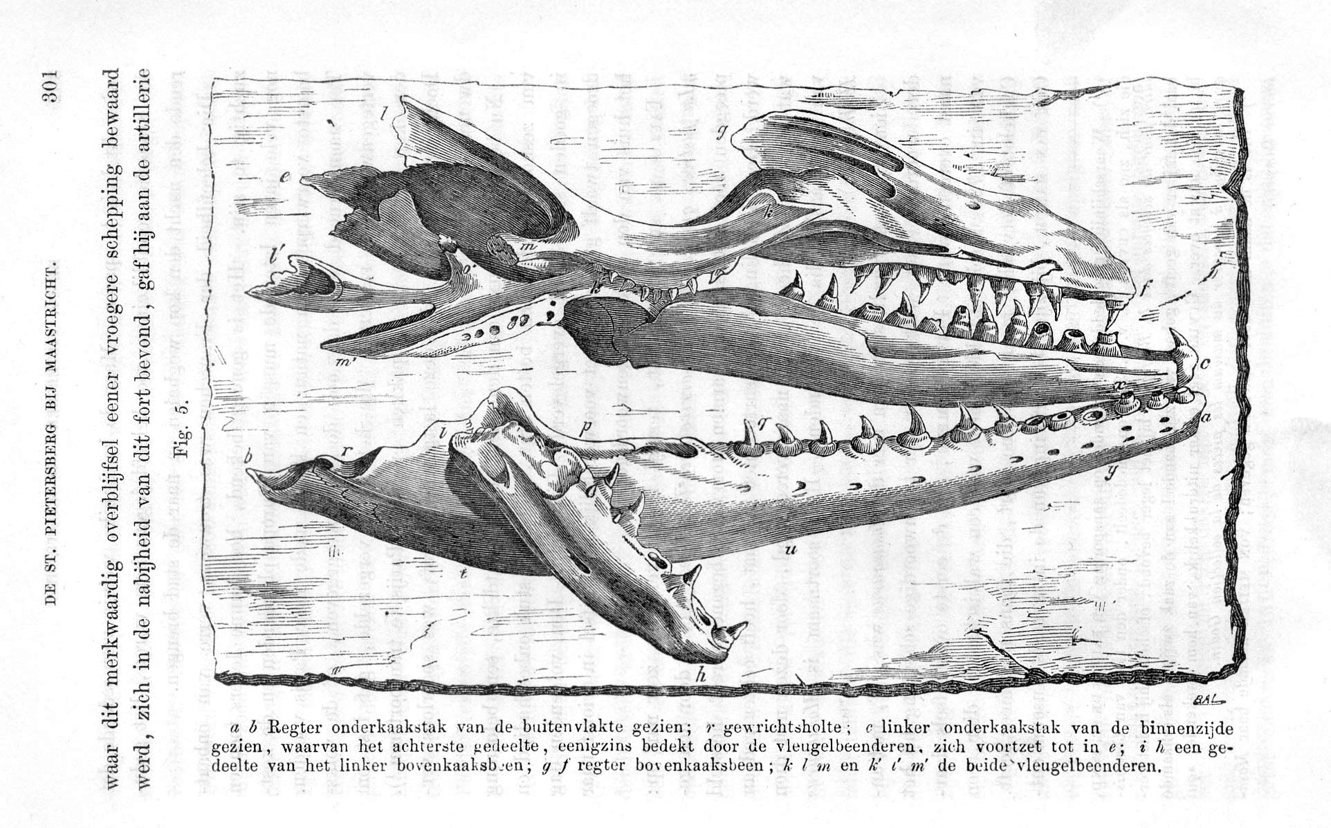 Mosasaurus hoffmannii. Fig.5 uit "De St.Pietersberg te Maastricht" pag 301, door P. harting. Gepubliceerd in "Album der Natuur, een werk ter verspreiding van Natuurkennis onder beschaafde lezers van allerlei stand", Groningen 1866. Scan en bewerking Ed Stevenhagen.